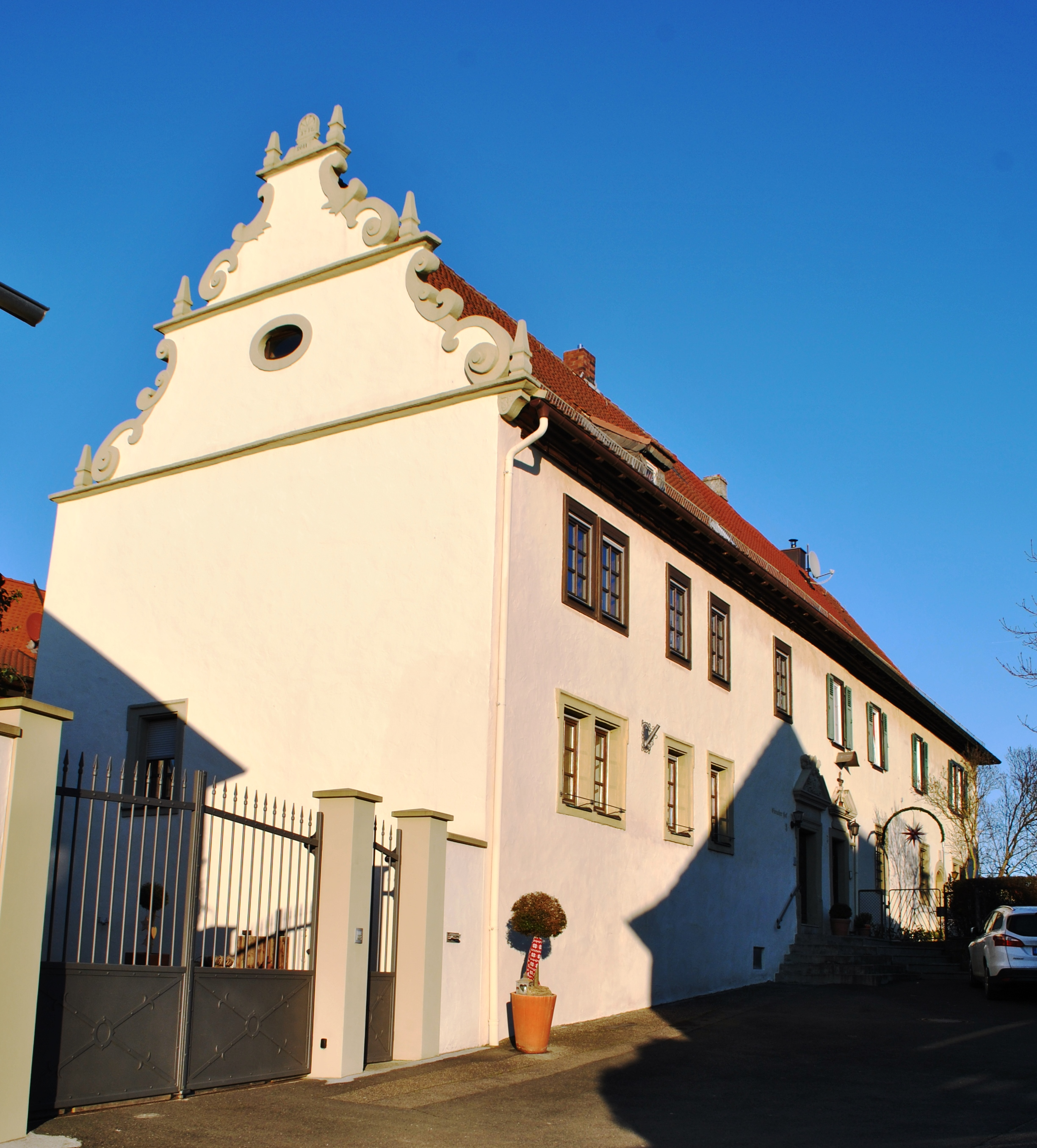 Ehemaliger Ebracher Hof Zweigeschossiger traufseitiger Satteldachbau mit Volutengiebel, geohrte Fensterrahmungen im Erdgeschoss, um 1600, Portal und Giebel bezeichnet „1712“ D-6-75-161-5